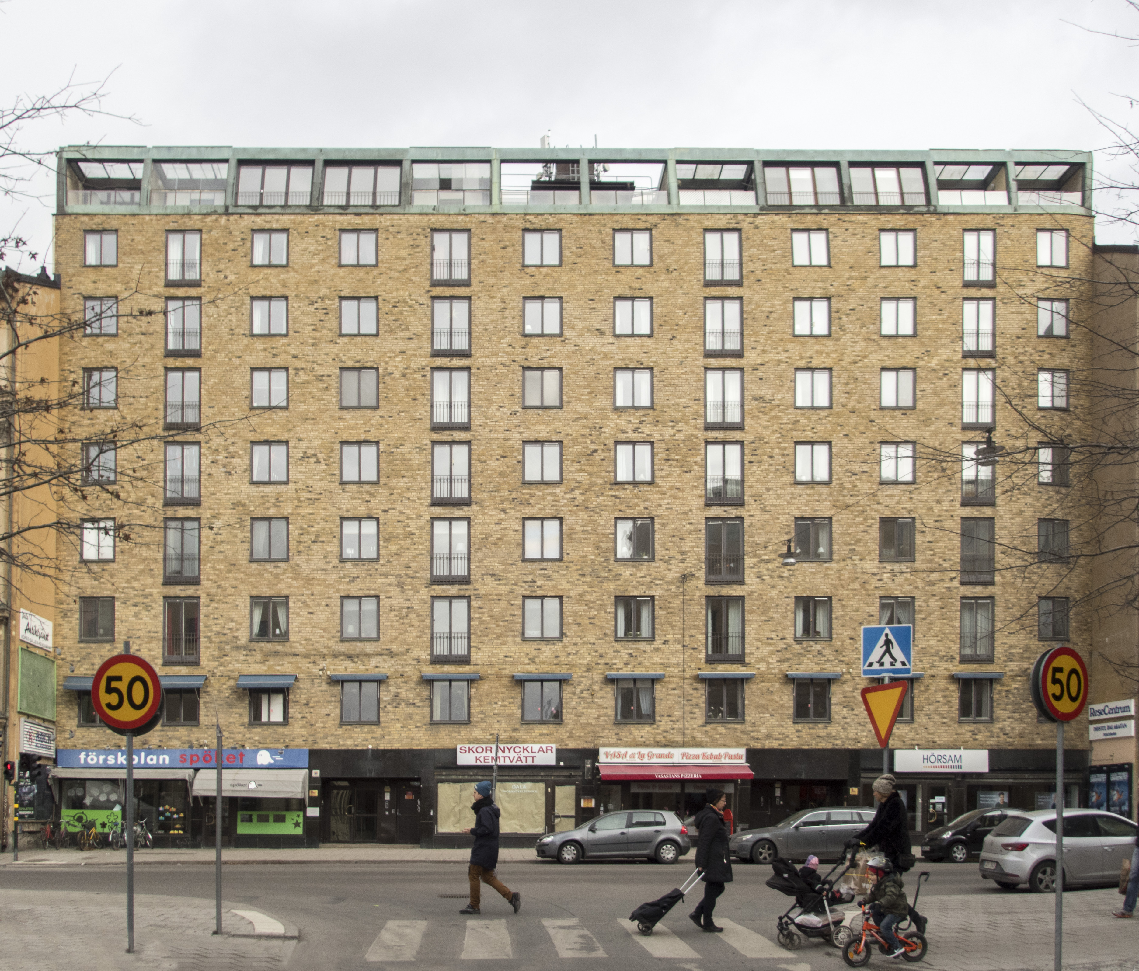 Nebulosan 33, Dalagatan 32-34 Stockholm Nybyggnadsår 1959 - 1960 Byggnadsfirma Folke Eriksson (Byggmästare) G. Nordström på FFNS Arkitektbyrå AB (Arkitekt) Olsson & Rosenlund (Byggherre)